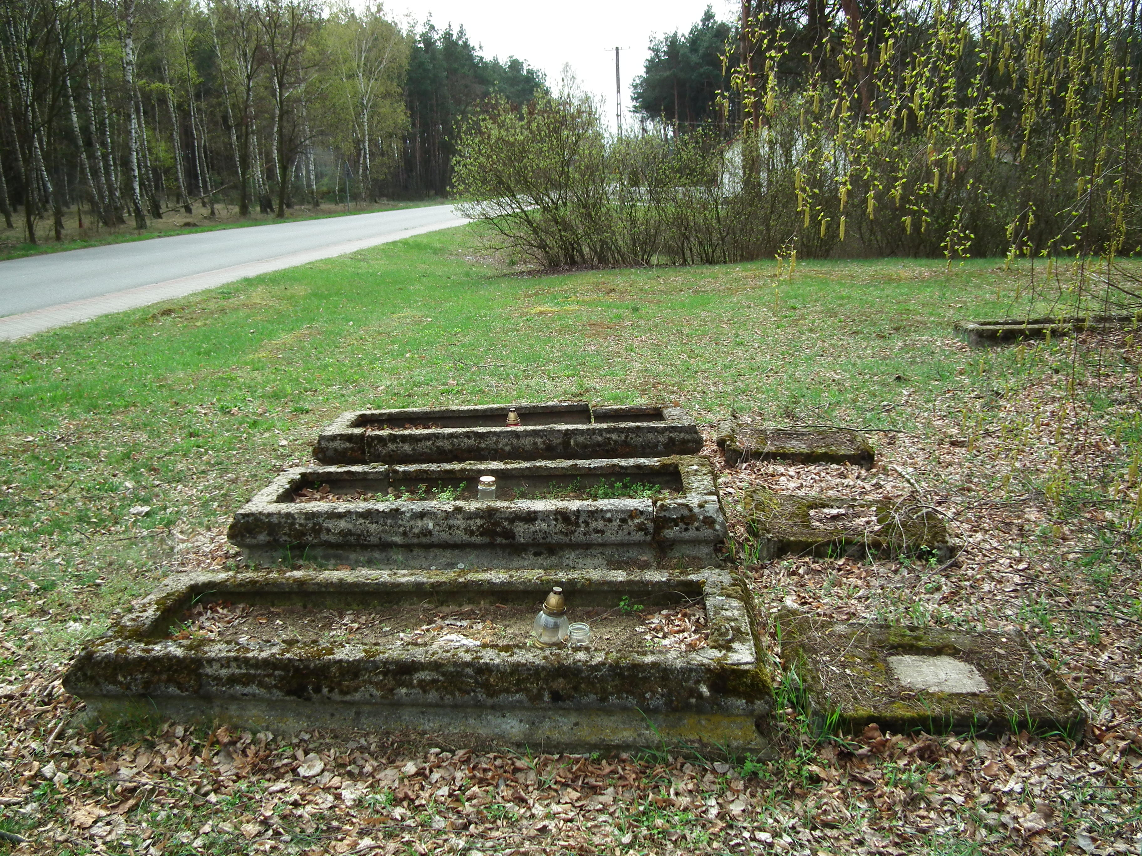 Stary cmentarz ewangelicki w Wierzchach (Puszcza Pyzdrska).